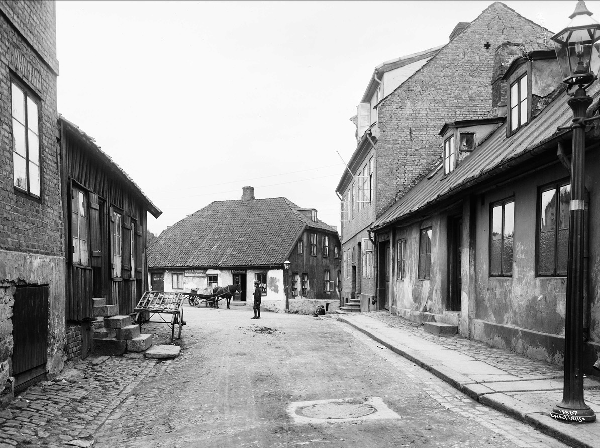 Nedre Hammersborggate mot Hammersborg torv Foto: Anders Beer Wilse/Oslo Museum